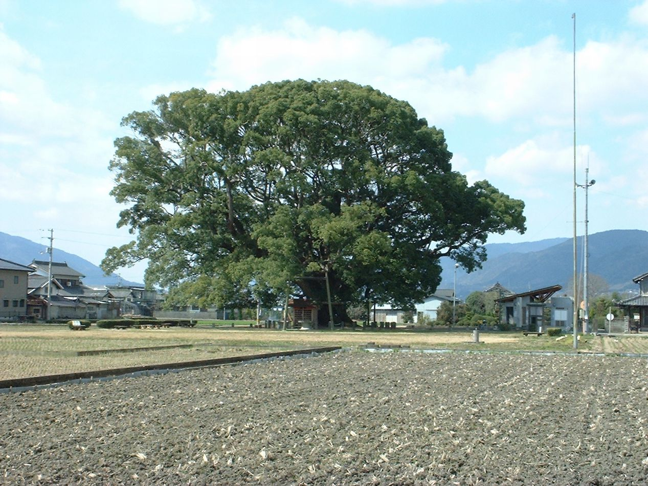 加茂の大クス 樹齢1000年余 徳島県三好郡ja:三加茂町（撮影当時。現・同郡ja:東みよし町）